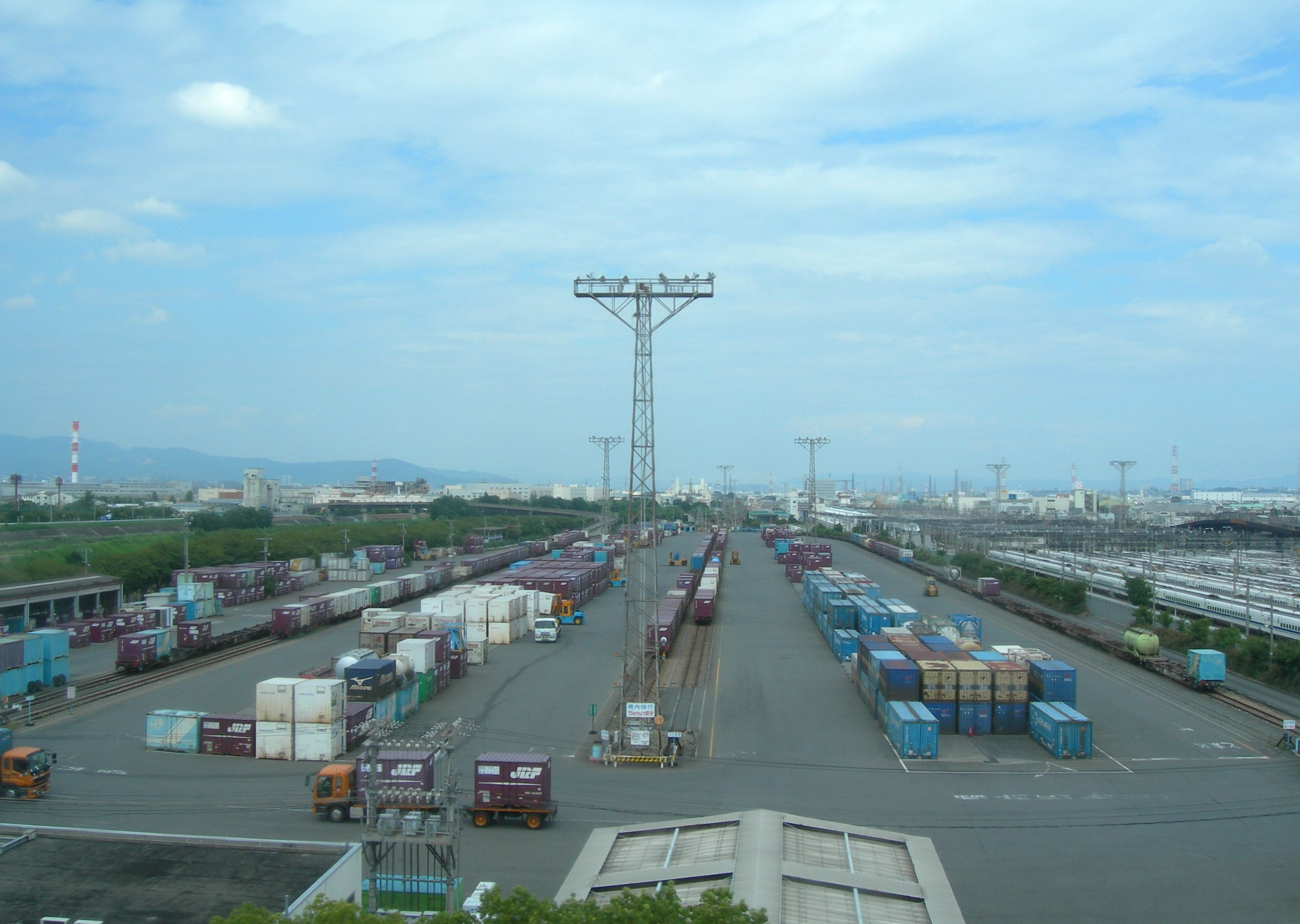 大阪貨物ターミナル駅